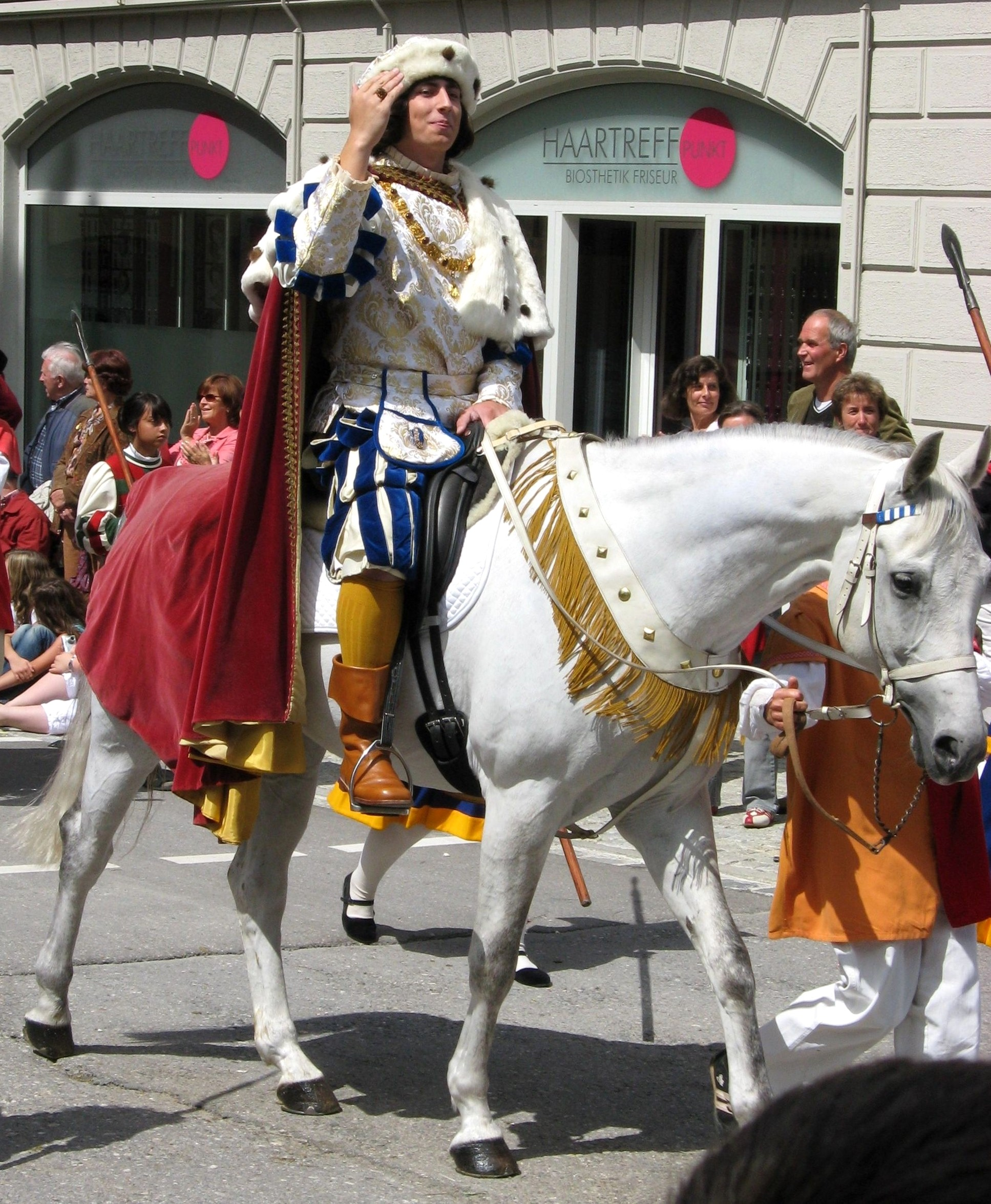 Tänzelefest 2008